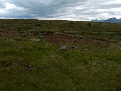 Iceland dwarf birch bog